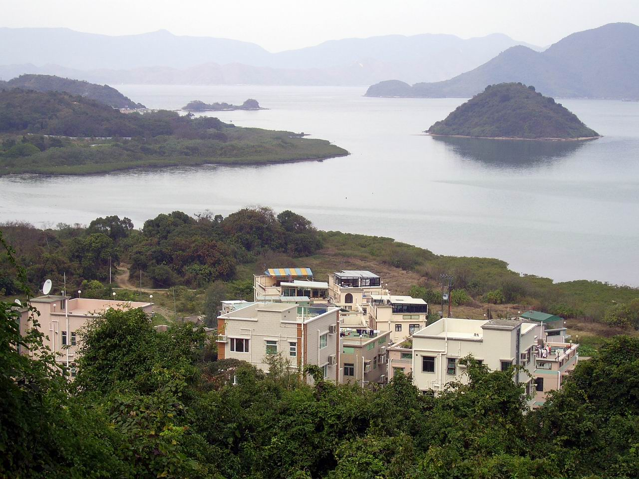 企嶺下海